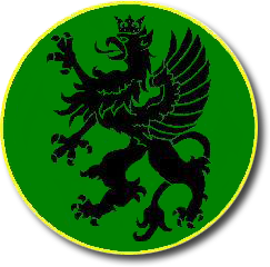 Oznaka rozpoznawcza 25 Dywizjonu Rakietowego Obrony Powietrznej